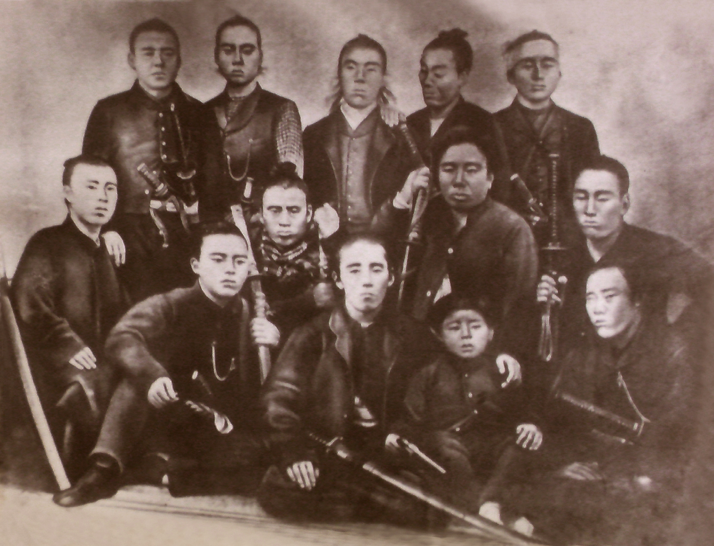 Jinshotai (Tosa Domain, Japanese Imperial Army in the Boshin War.)